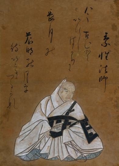 Sosei Hoshi, portrait par Shojo Shokado